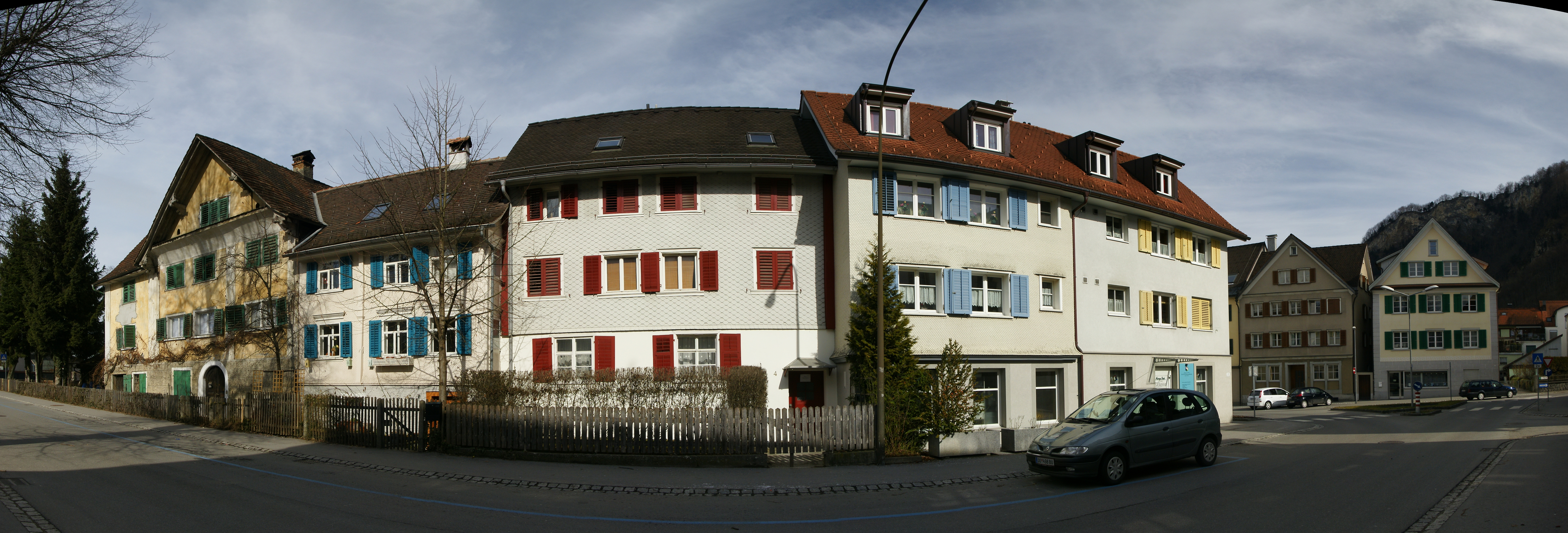 ein Teil des Jüdischen Viertels in der Jakob-Hannibal-Str. Nr. 10/8/6/4/2 in Hohenems.